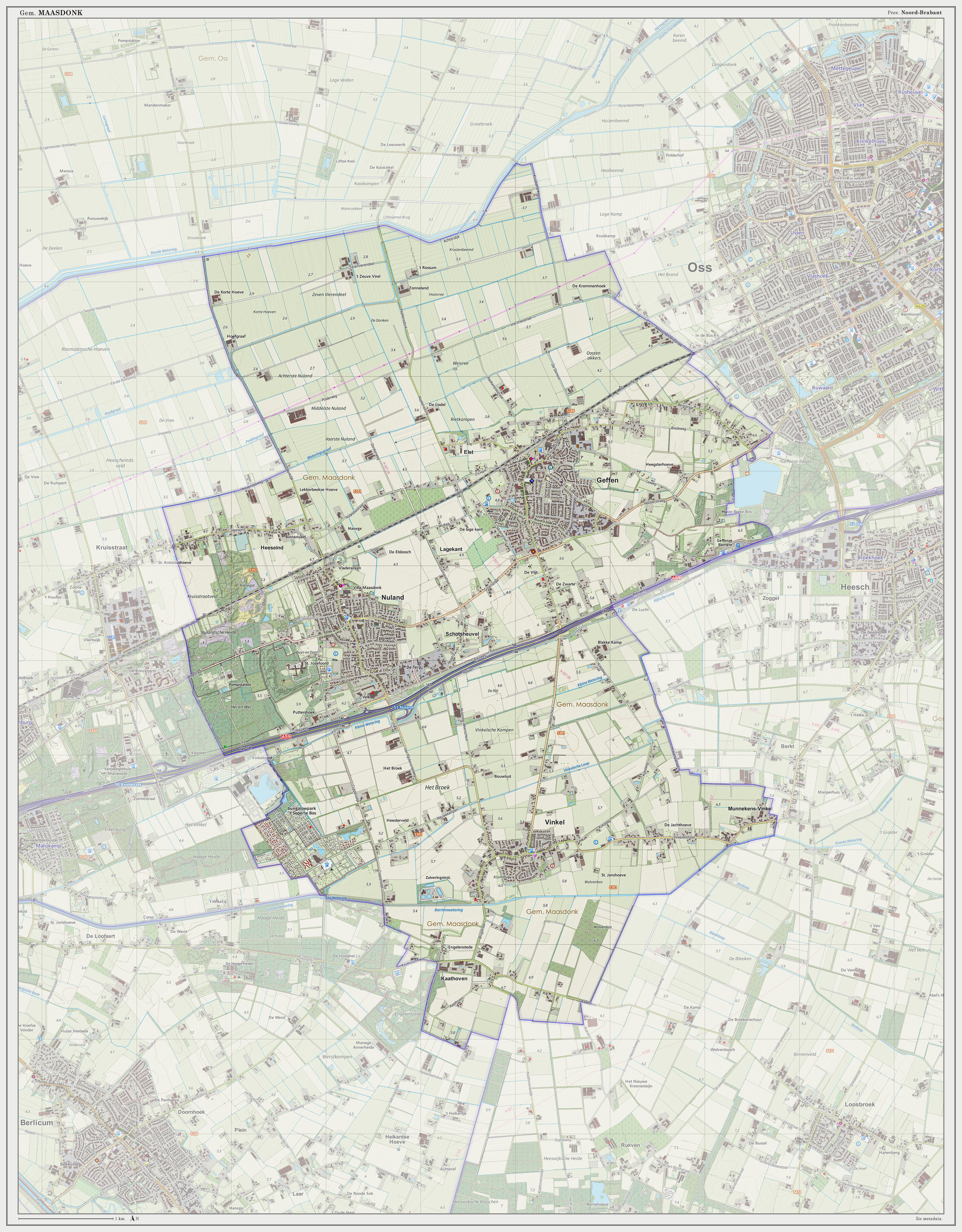 Topografische gemeentekaart per september 2014. Resolutie: 300 pixels/km. Kaartbeeld samengesteld uit de open geodata van de Top10NL en Top25namen (Kadaster, 30-sep-2014), Creative Commons-BY licentie. Gebouwvlakken uit open geodata BAG extract (8-sep-2014). Wegen uit de OpenStreetMap (15-sep-2014), OpenStreetMap community. Reliëfschaduw uit de Actuele Hoogtekaart AHN2 (8-mrt-2014). Samenstelling en kleurenschema: Jan-Willem van Aalst, met QGIS. Zie ook de Legenda.